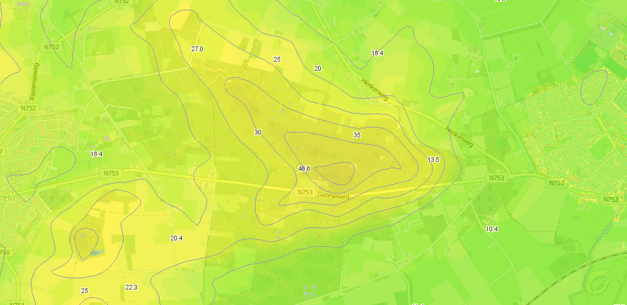 Hoogtelijnenkaart Herikerberg, schaal 1:14.833